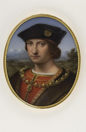 Médaillon de Charles II d'AMBOISE, Grand-Maître et amiral de France, vice-roi de Lombardie, gouverneur de gênes et de Milan. Ami et protecteur de Léonard de Vinci.